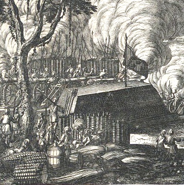 Беларуская (тарашкевіца): Швэдзкія пазыцыі, умацаваныя габіёнамі, пры аблозе Берасьця